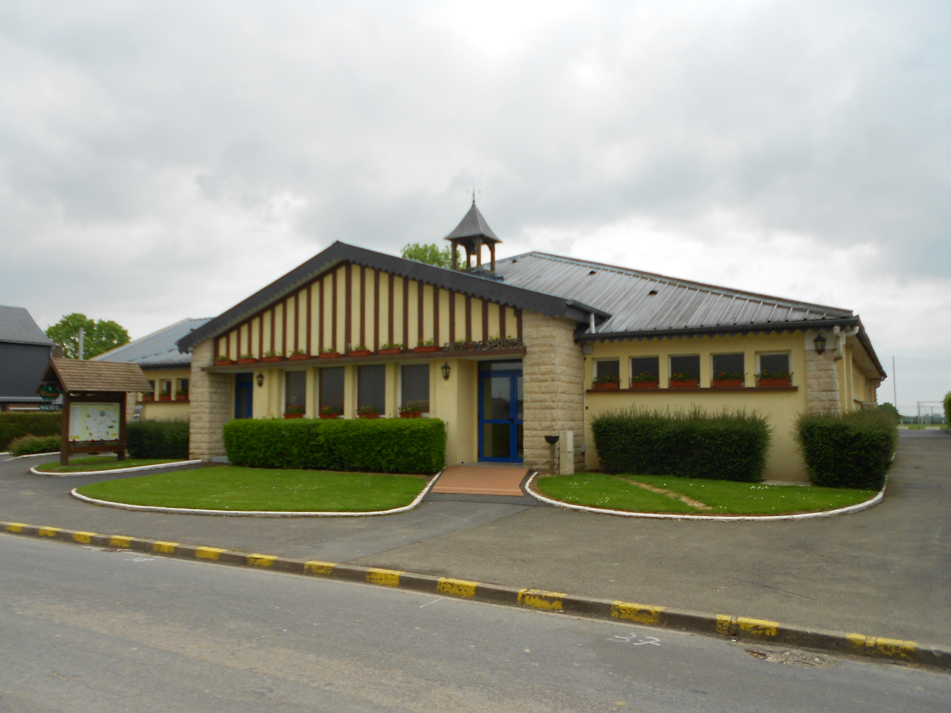 Mairie de Criquiers (Seine-Maritime, 76)